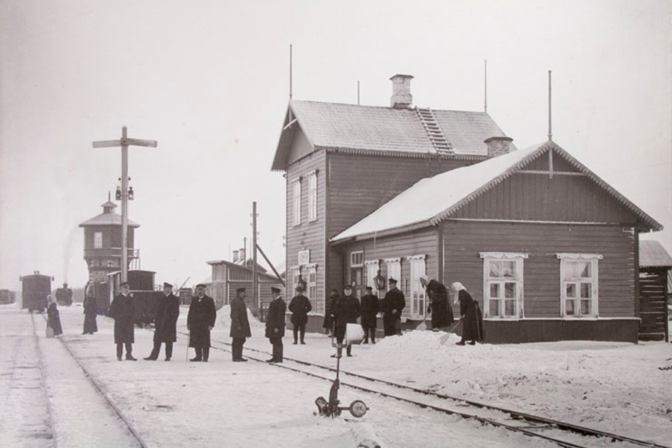 Lauri (Käru) jaam 20. sajandi alguses